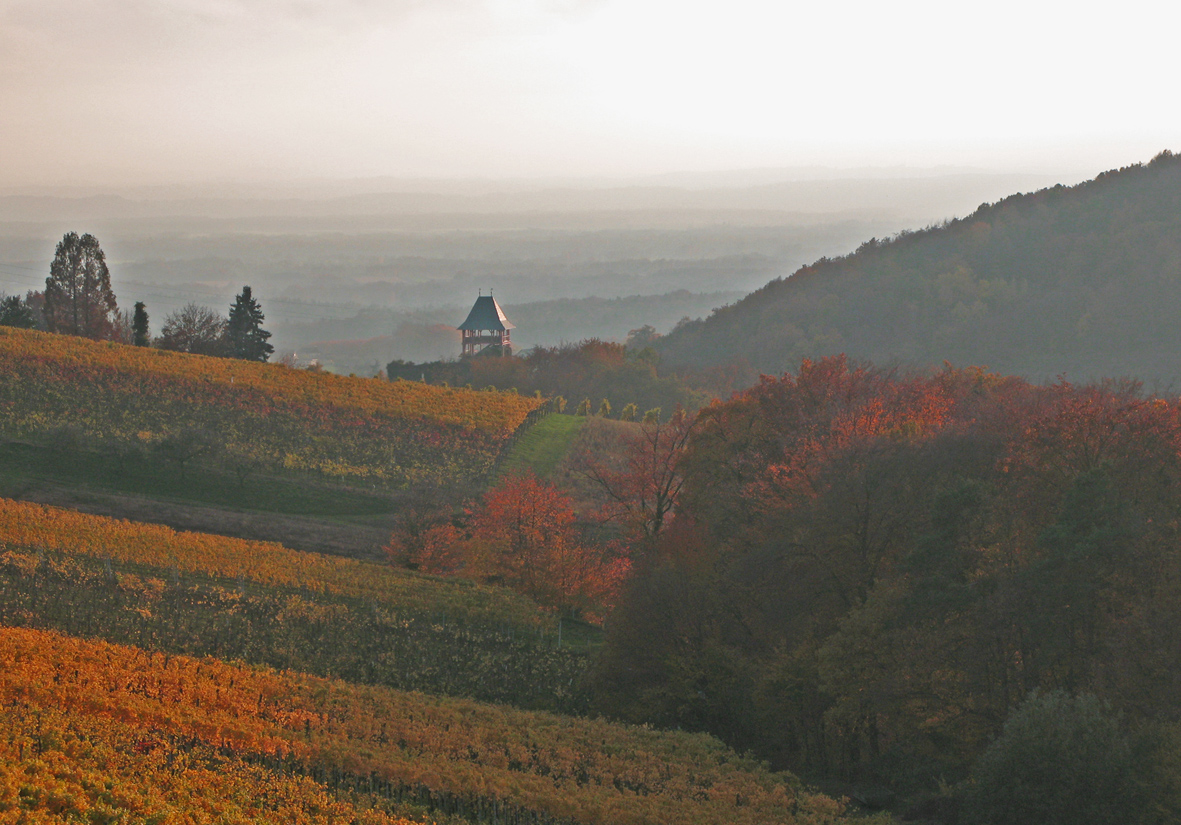 Klöch in Steiermark, der ehemalige Bergfried der Burg Klöch